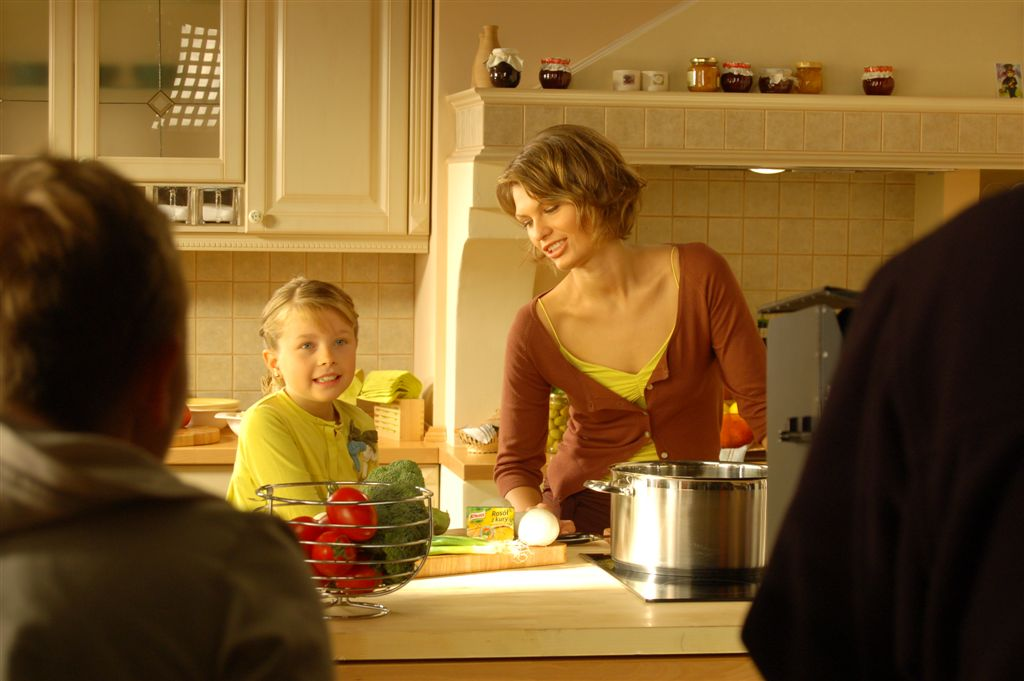 Aufnahmen TV-Werbung einer Lebensmittelmarke